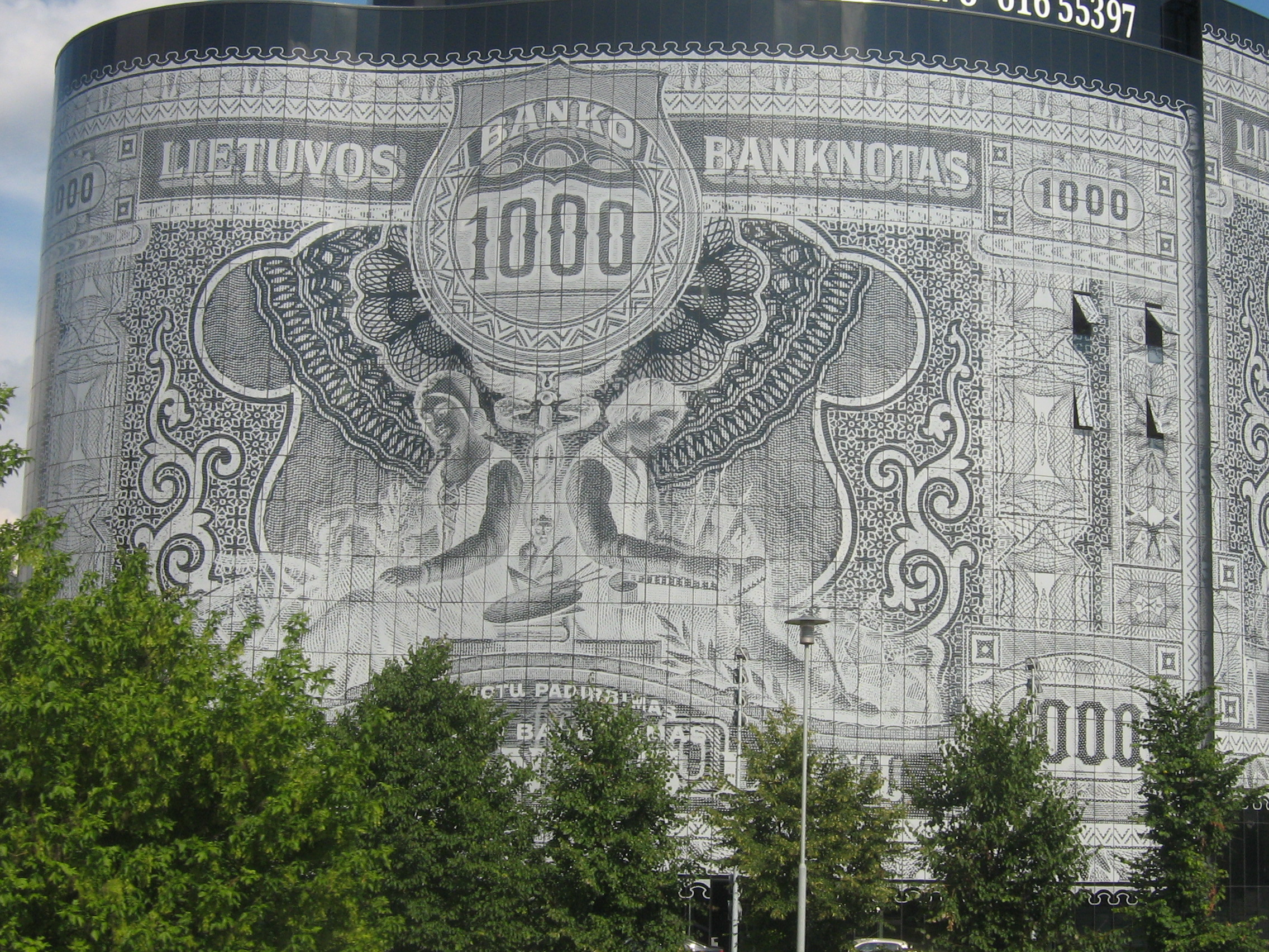 1000 lt banknoto pastatas, Kaunas.